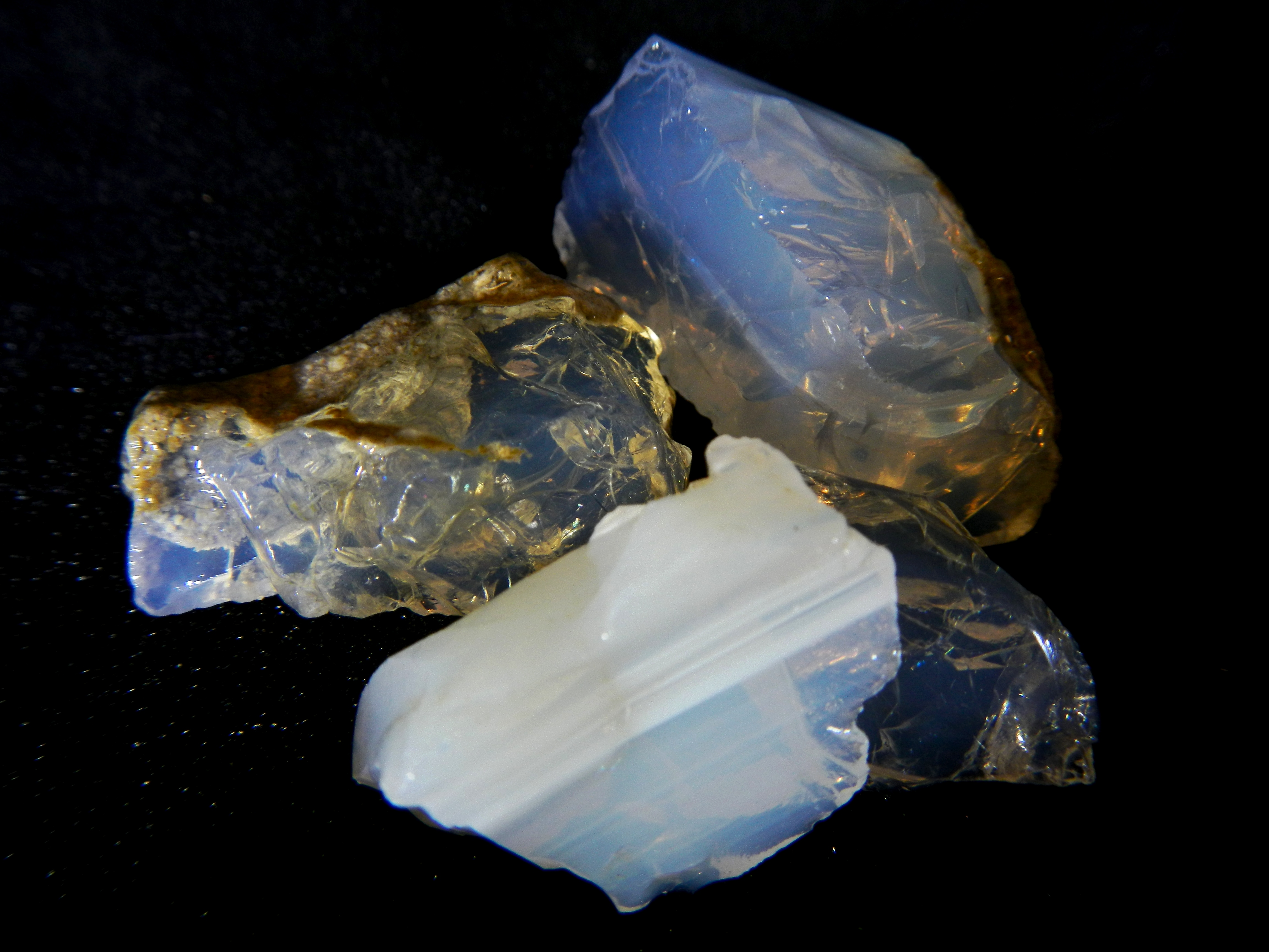 Slovenský opál